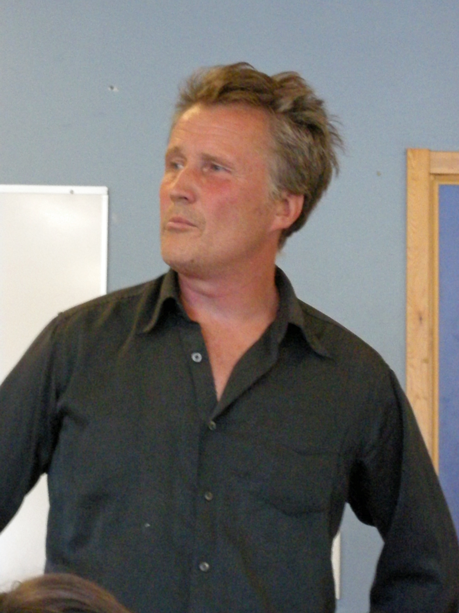 Författaren Dan Höjer på klassbesök i Sunnerbyskolan, Sorunda, Sverige